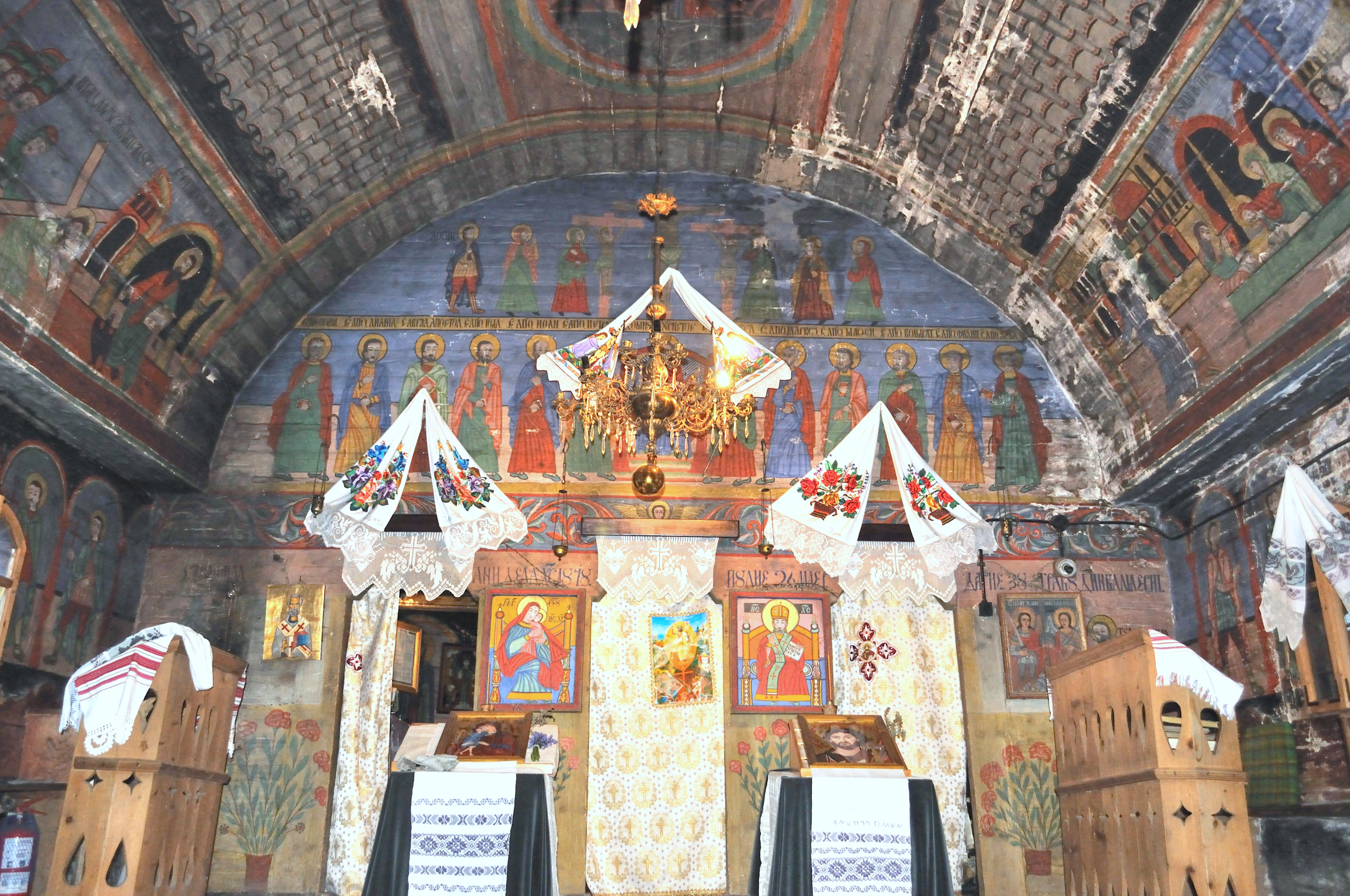 Biserica de lemn „Sfinții Arhangheli” din Ocolișel, județul Cluj